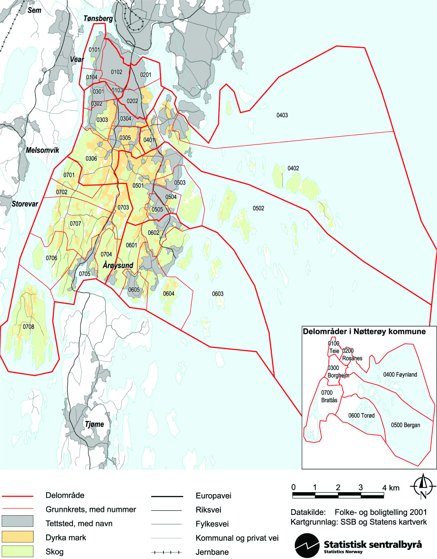 Statistiske grunnkretser i Nøtterøy kommune (per 3. november 2001)